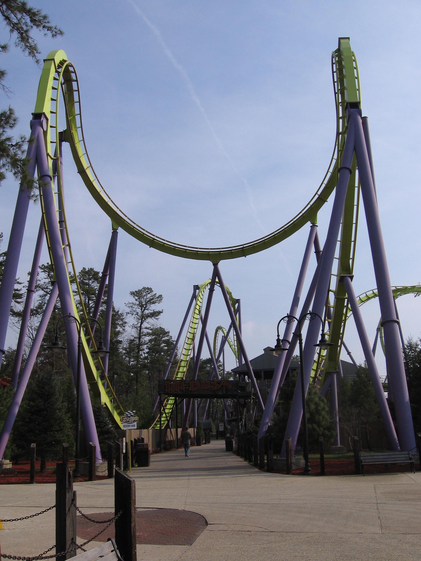 Took it myself. Dusso Janladde 04:25, 2 April 2006 (UTC)